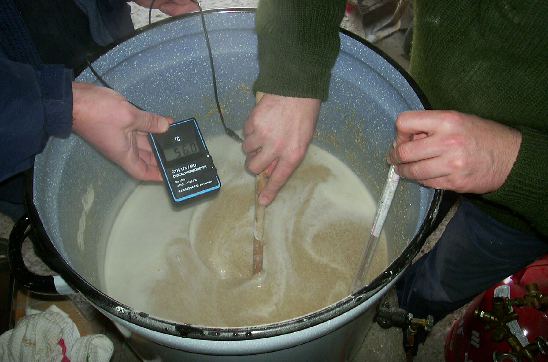 Temperarturmessung beim Hobbybrauen